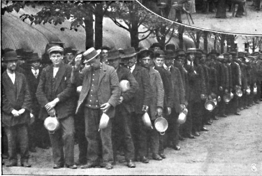 Antreten der Internierten vor der Ausgabe des Essens.